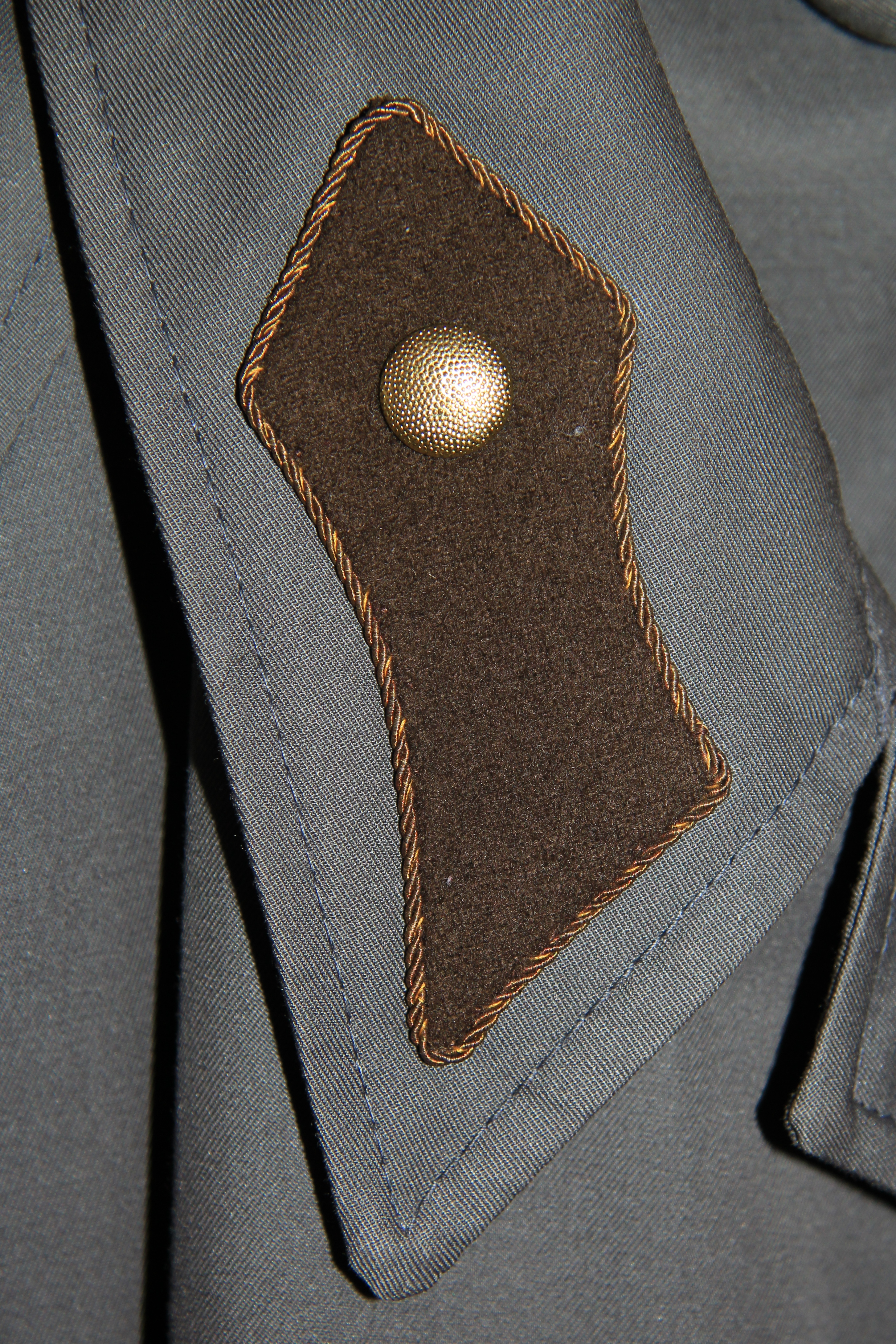 Mantelparoli bei den NÖ Feuerwehren, hier in braun für Feuerwehrtechniker